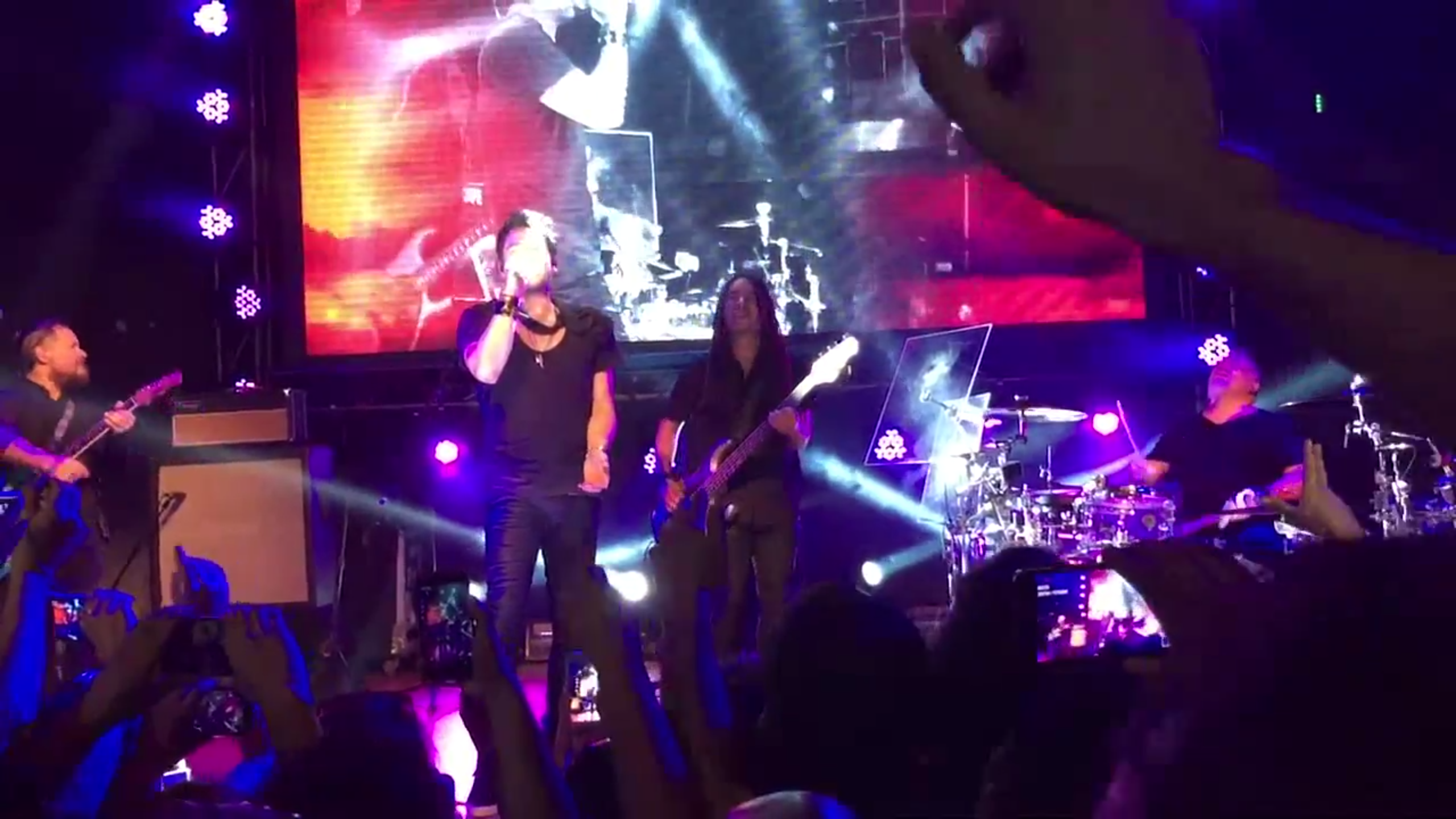 La ley en Chile 2016